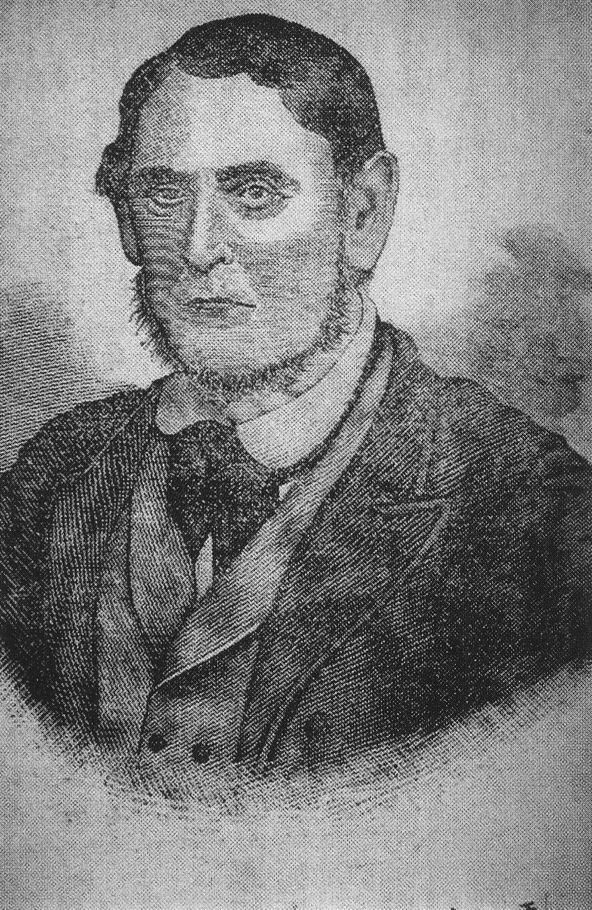 Japanischer Holzschnitt von Otto Gottlieb Mohnike (1814-1887), Arzt in Japan von 1848-51.